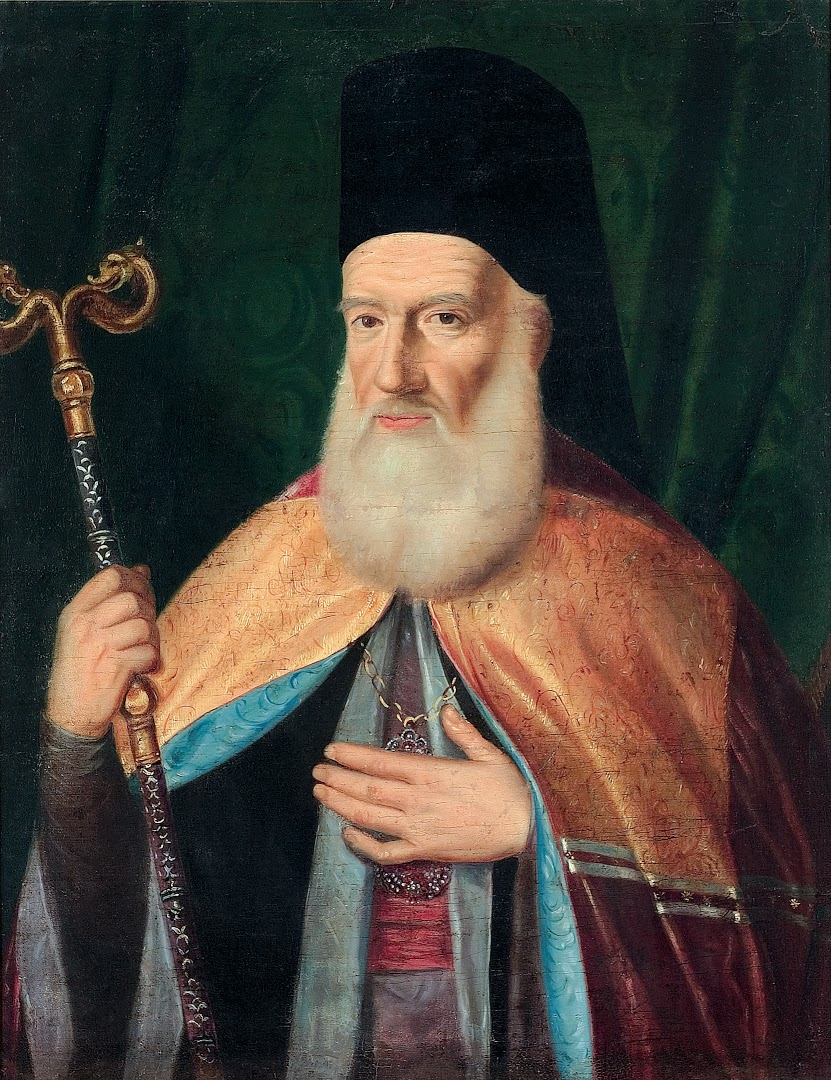 Картина на Димитър Добрович